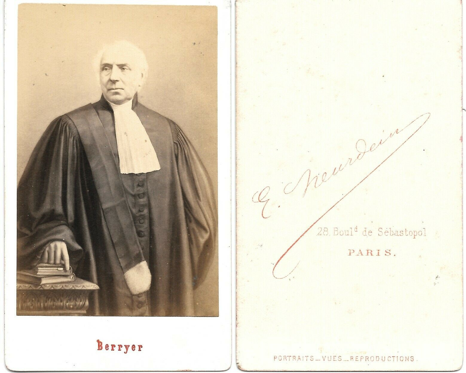 Pierre-Antoine Berryer